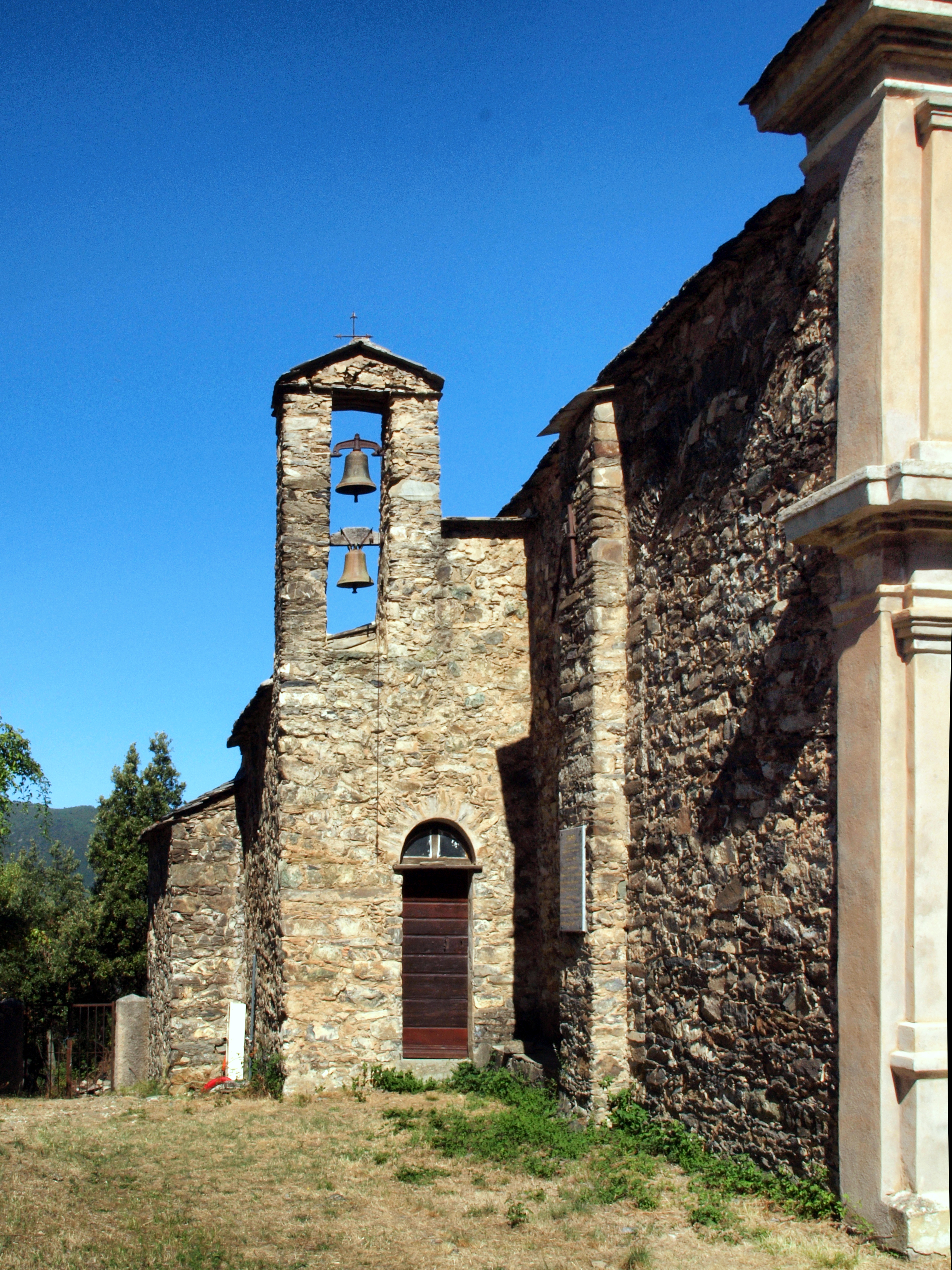 Érone, Casaluna (Corse) - Clocher de l'église paroissiale San Martino. Sur le renfort méridional, une plaque commémorative aux enfants morts durant la guerre de 1914-1918